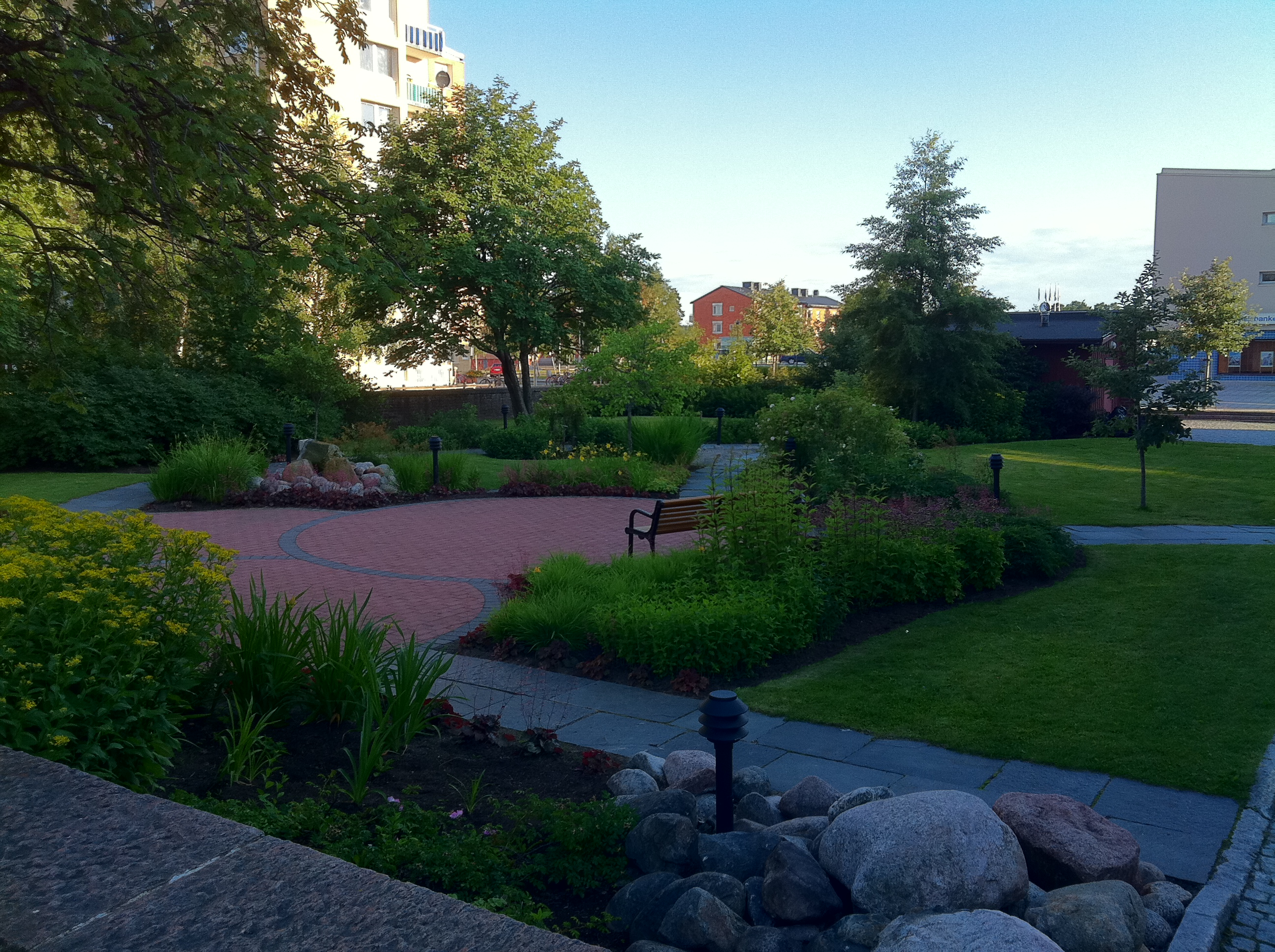 Foto taget från församlingshemmet trädgård/park